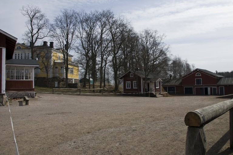 Talosaari, Talosaaren l. Husön kartano, Talosaarentie 283. Päärakennus ja talousrakennuksia, Husön Ratsastuskeskuksen tallit.